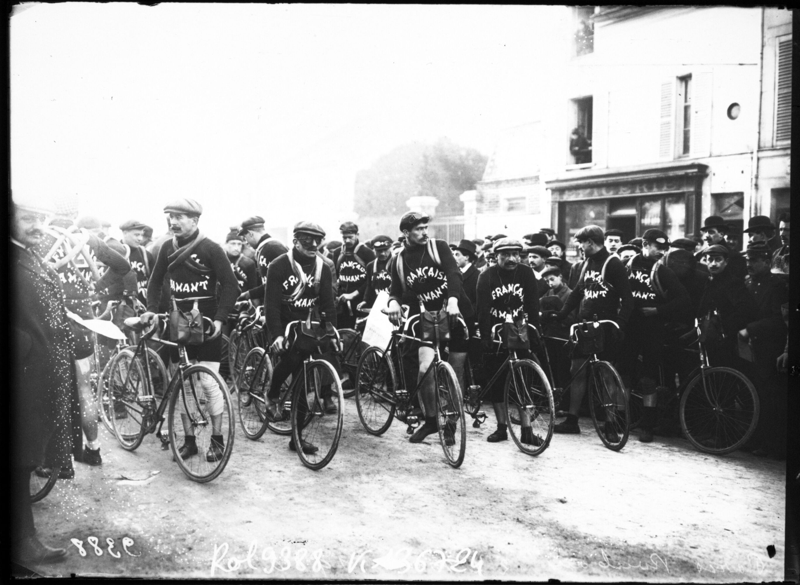 Départ du Paris-Roubaix 1910